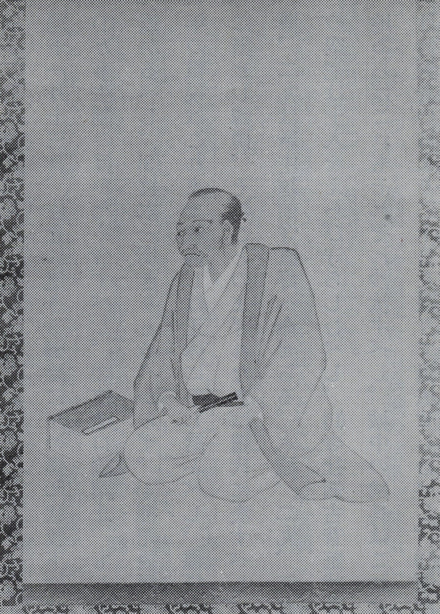 堀田正信の肖像(モノクロ)。